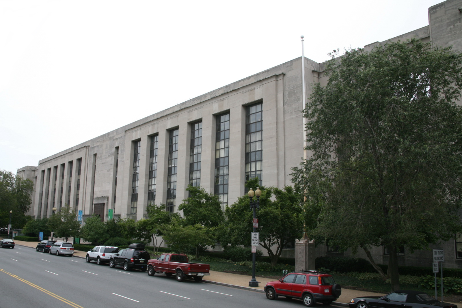 Wilbur J. Cohen Federal Building, home to the Voice of America, located at 330 Independence Avenue, SW in Washington, D.C. The structure is also known as the Social Security Administration Building and is listed on the National Register of Historic Places.